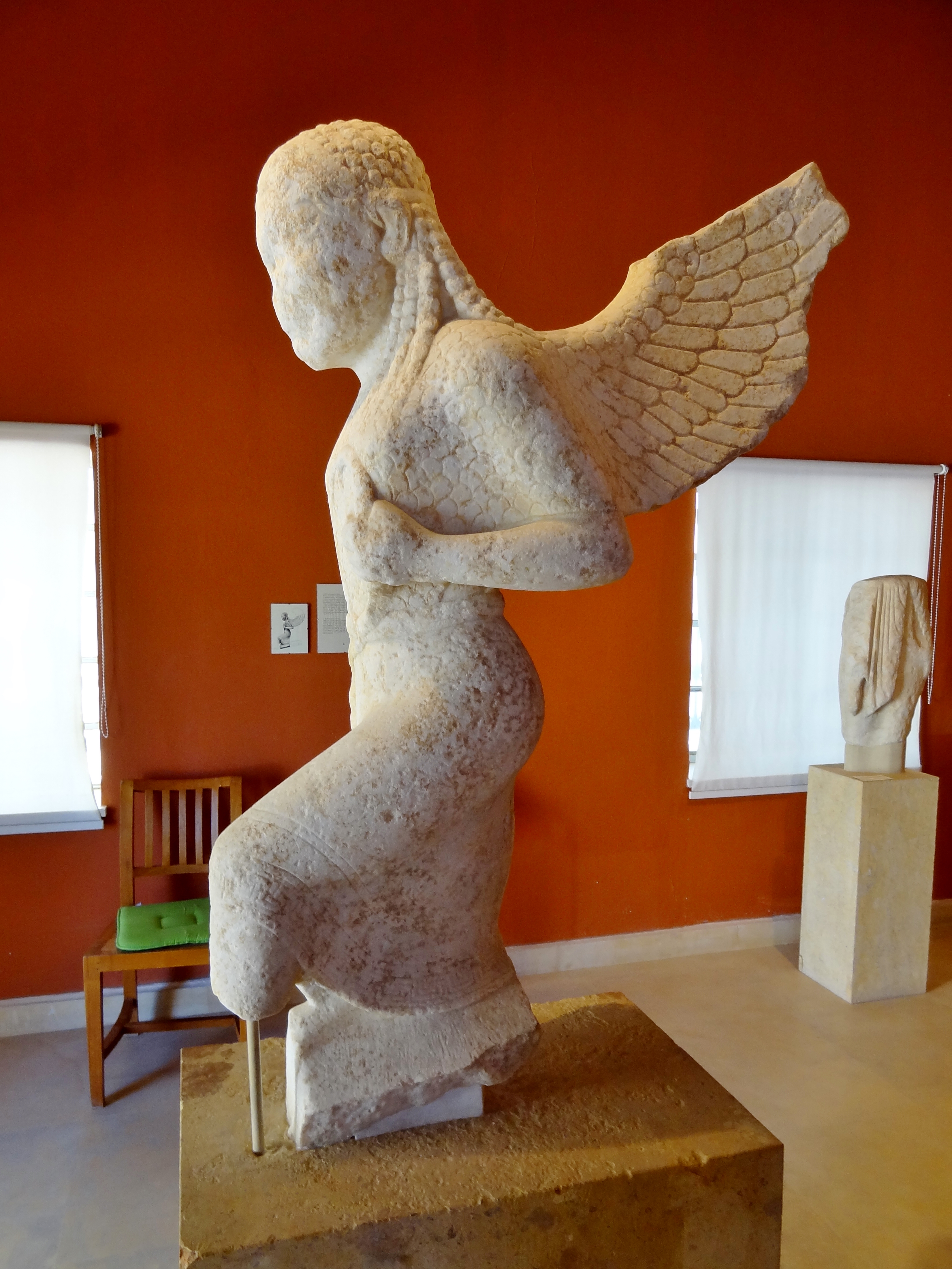 Skulptur einer Gorgone aus der Mitte des 6. Jahrtausends v. Chr., gefunden nahe dem Ausstellungsort im Archäologischen Museum von Parikia auf Paros, Kykladen, Griechenland